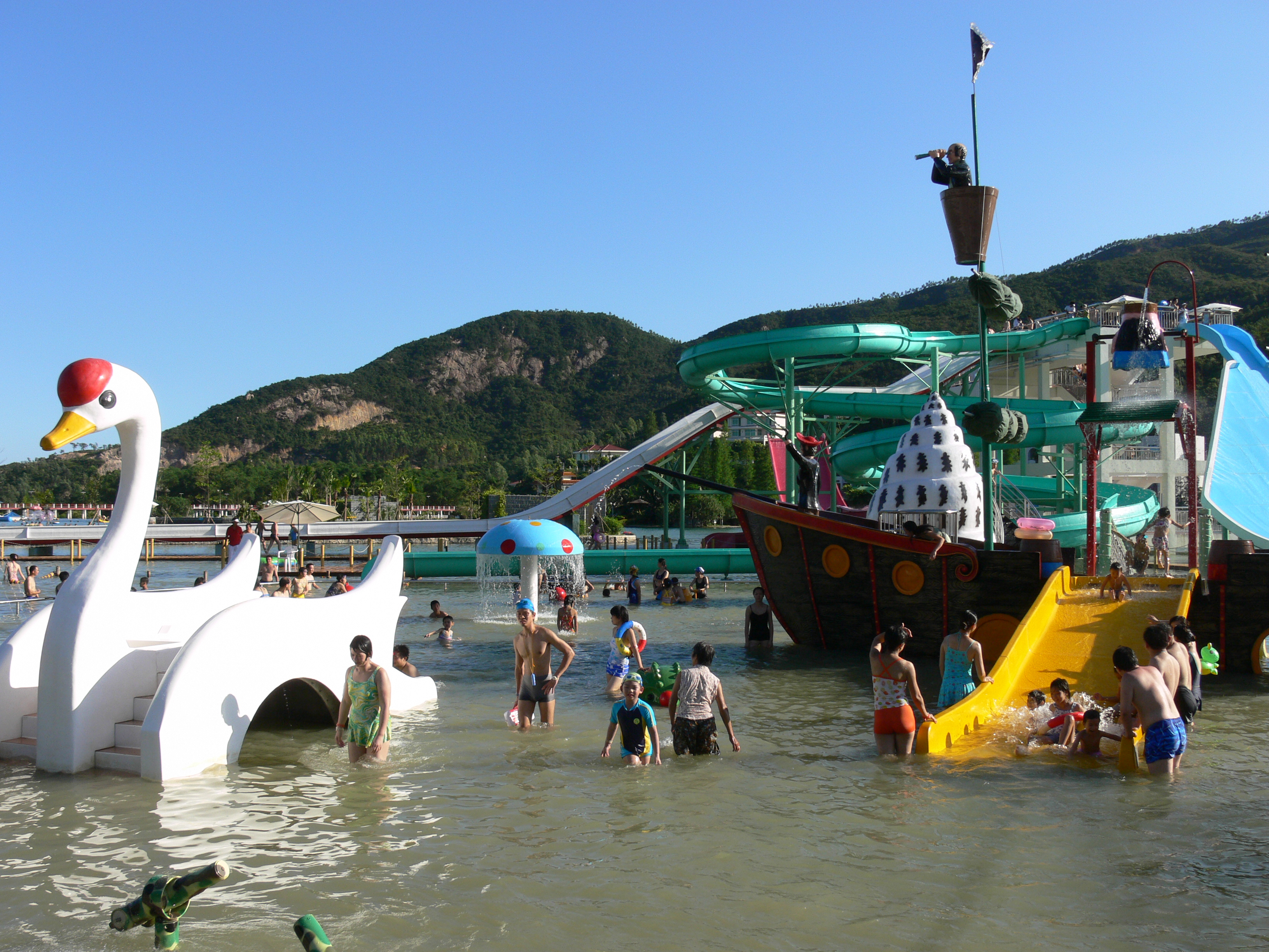 這是古兜溫泉水世界，是景區內的其中一個大型水世界